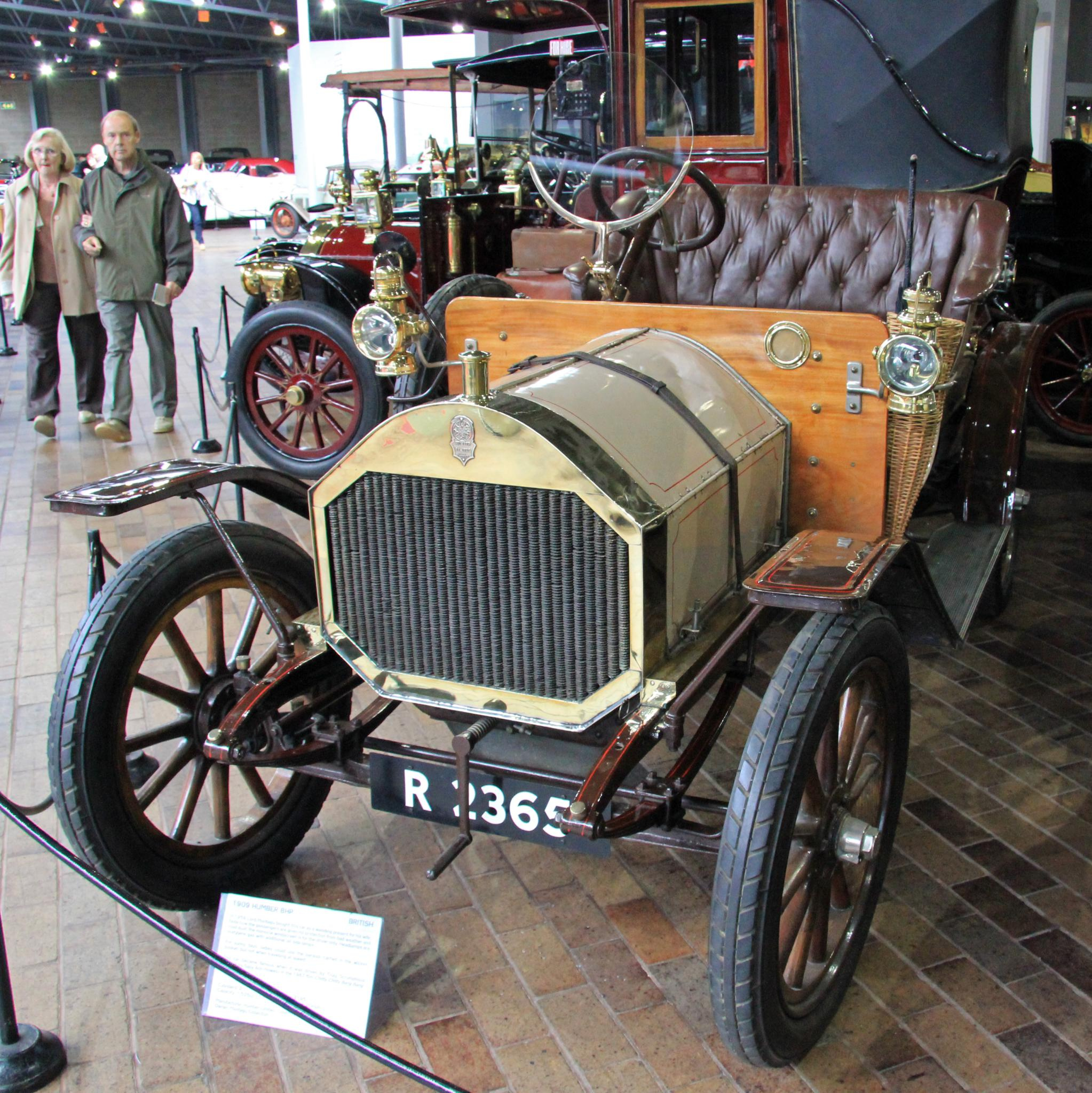 1909 Humber 8hpBeaulieu National Motor Museum 18-09-2012